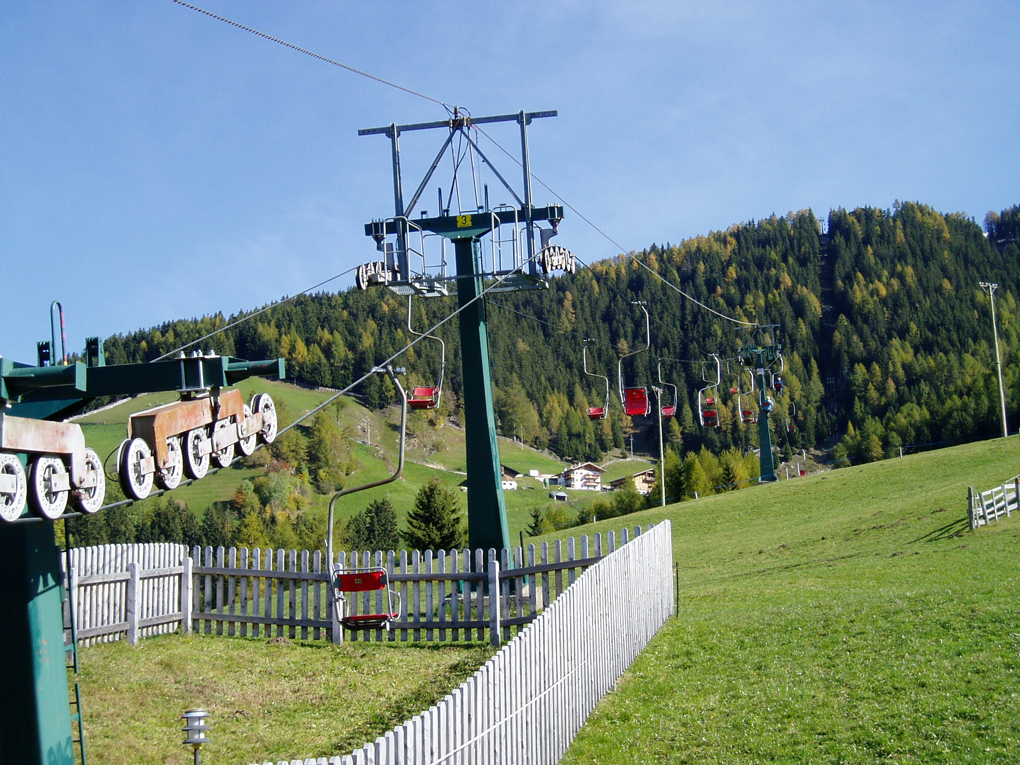 Sessellift Grube im Meraner Land, Südtirol